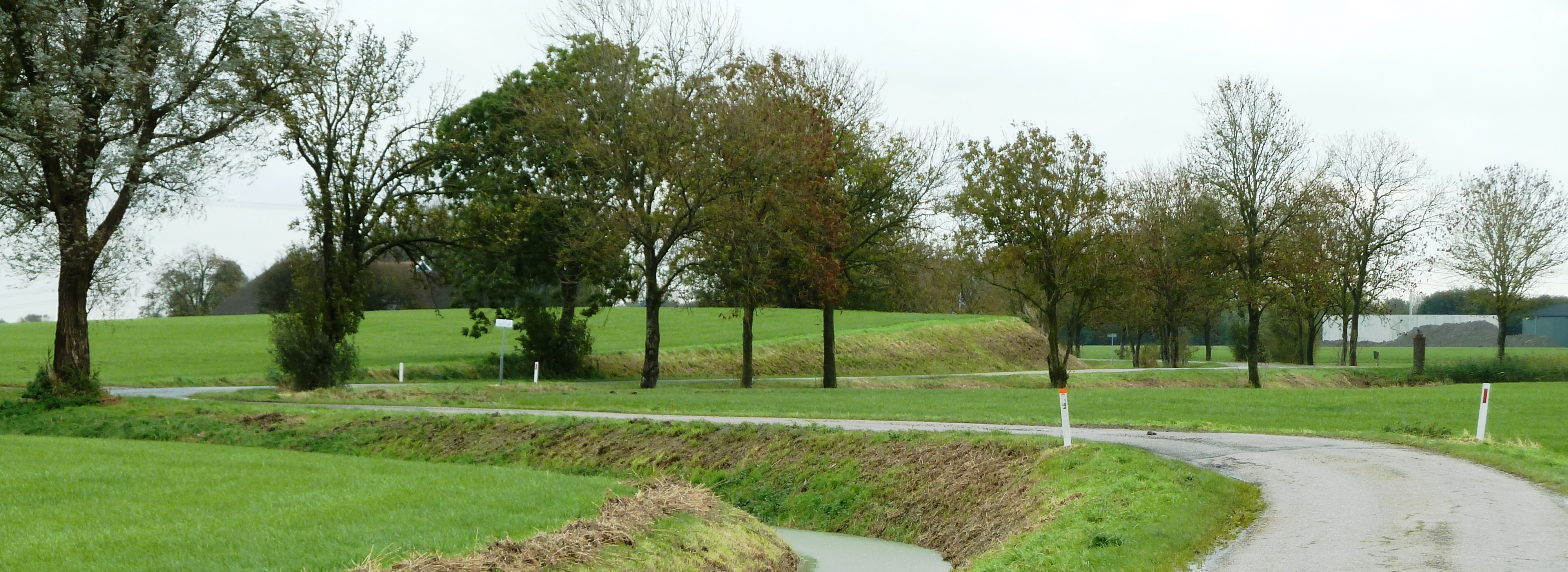 Panorama over de voor driekwart afgegraven Groningse wierde Antum met rechts boerderij Koepon.